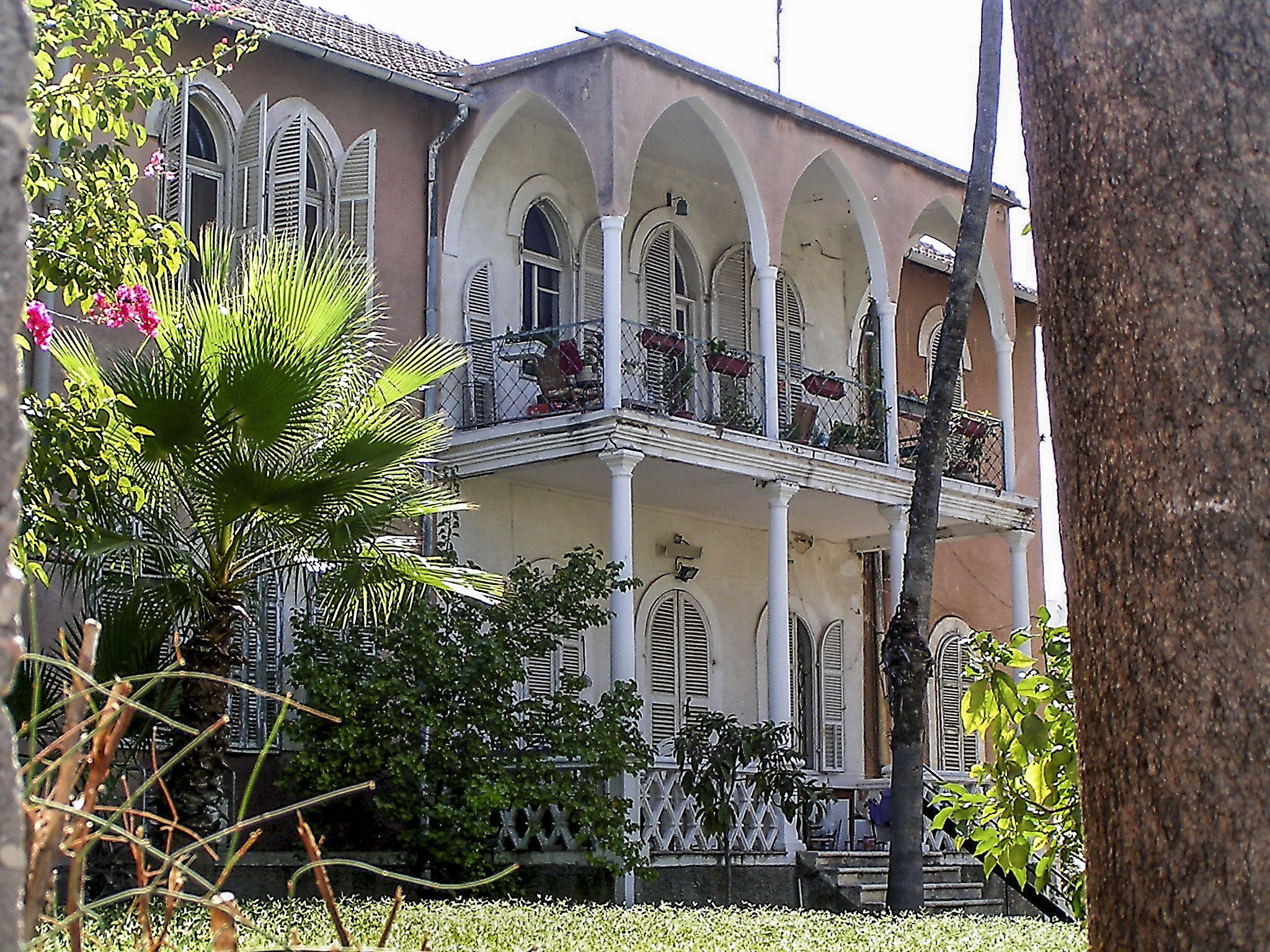 בית העם - שימש כמרכז החיים התרבותיים של המושבה בסגנון אקלקטי אופייני המזכיר טירה עתיקה ומשלב אלמנטים מחומת ירושלים.